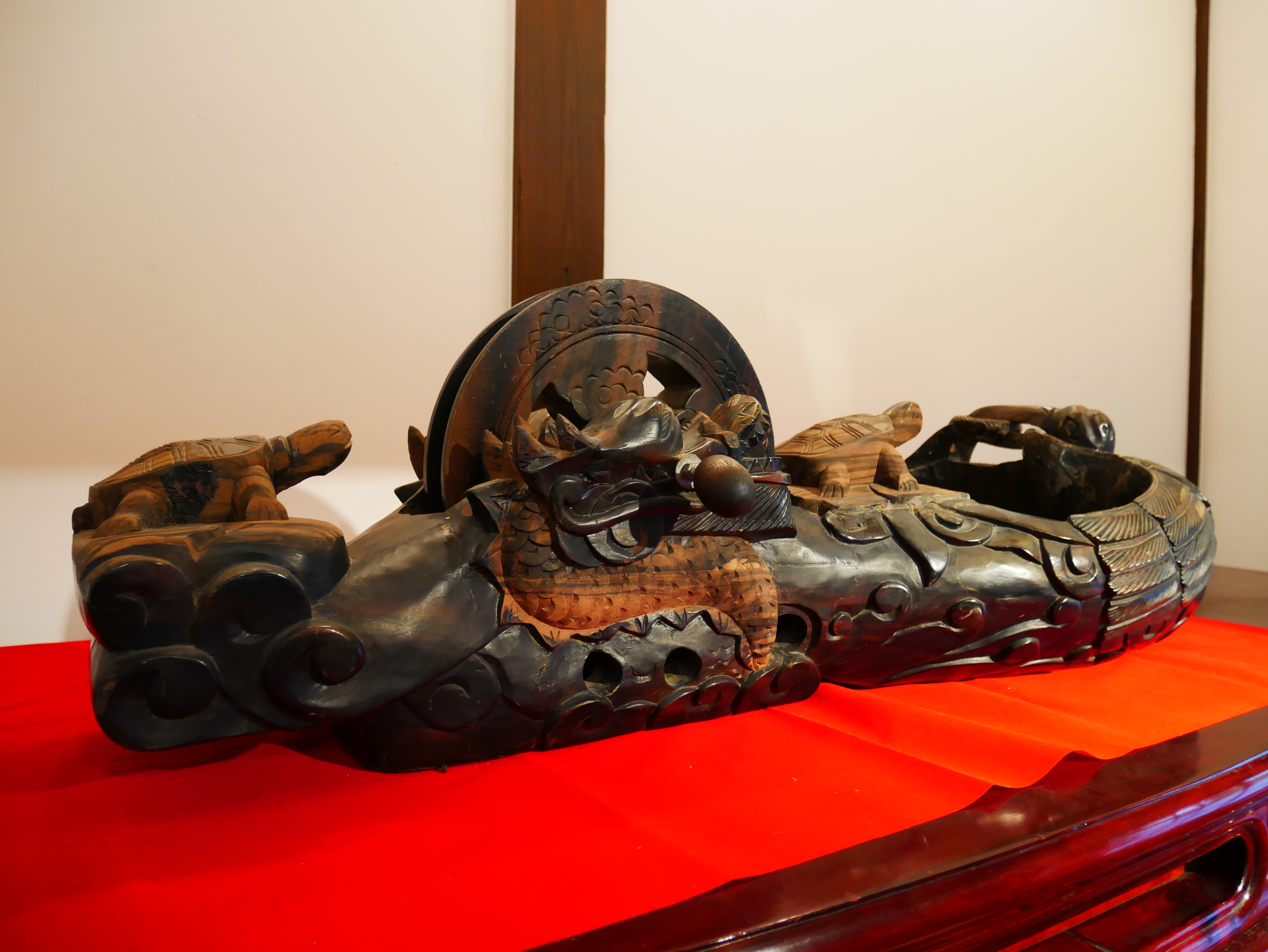 中文（台灣）: 桃園市立大溪木藝生態博物館所藏墨斗，桃園市大溪區興和里